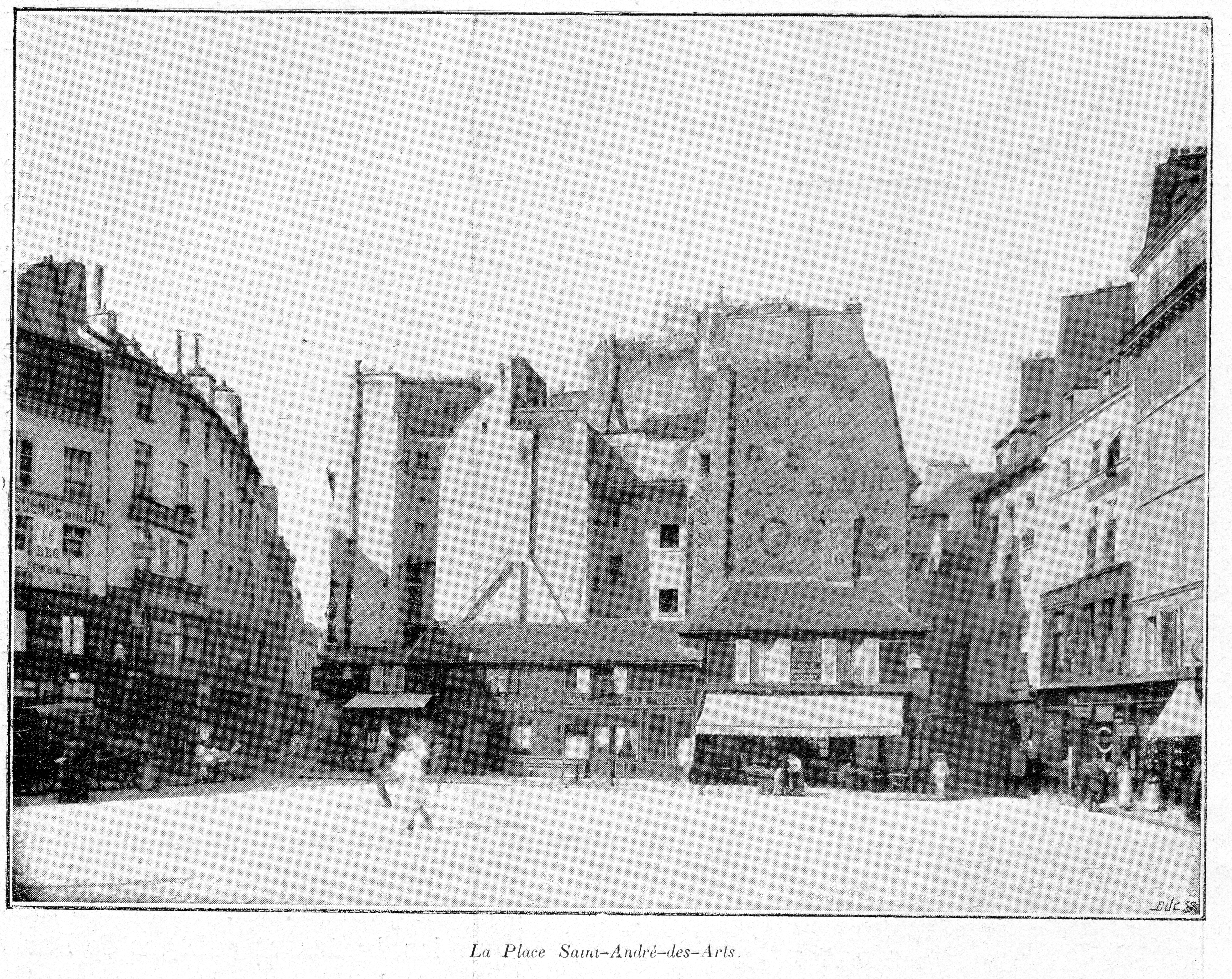 Clément Maurice Paris en plein air, BUC, 1897,La Place Saint-André-des-Arts